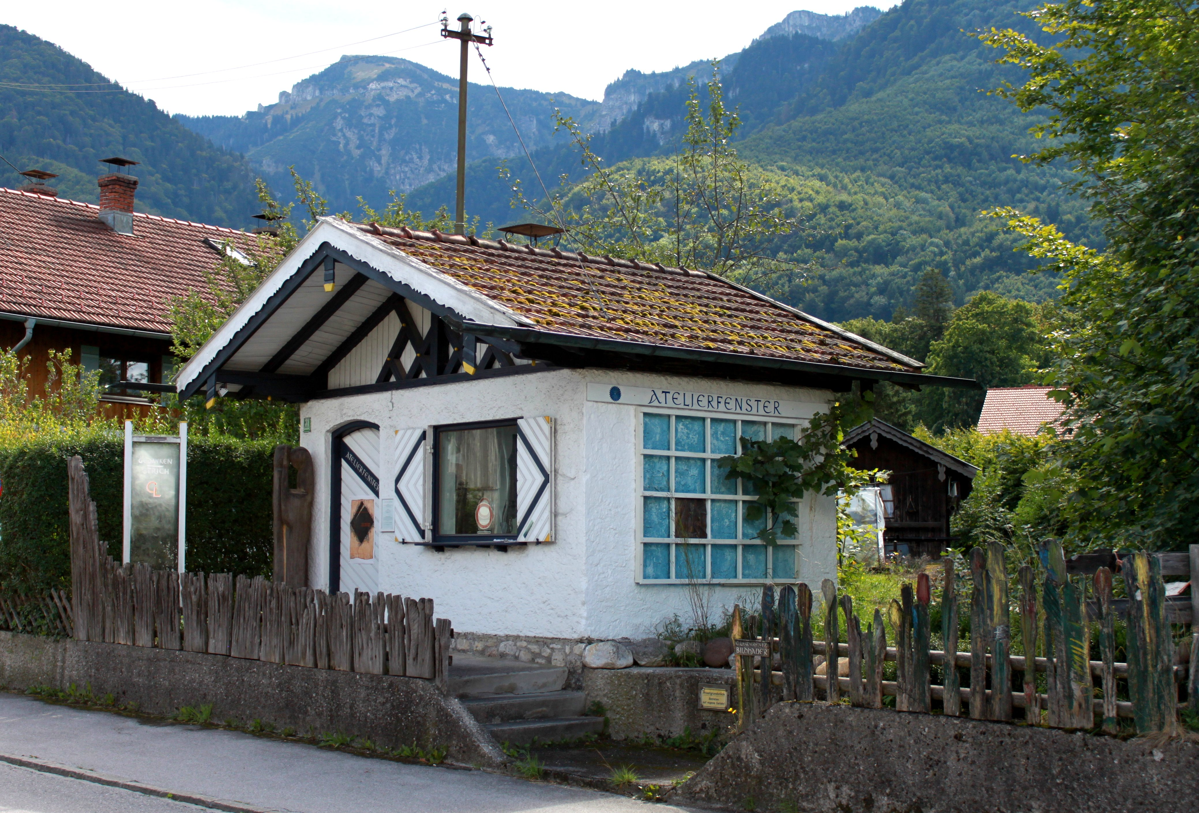 Das "Atelierfenster", ein Ausstellungsraum in Staudach-Egerndach, Bahnhofstr. 31; Betreiber: Carsten Lewerentz